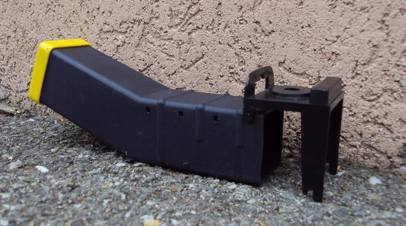 Röhrenfalle mit Kippmechanismus (a) Der abnehmbare gelbe Verschluss wird von innen mit Köder (z.B. Erdnussbutter) bestückt und wieder aufgesetzt. (b) Die Maus geht von rechts in die Falle. (c) Wenn die Maus versucht, an den Köder zu kommen, kippt die Falle nach links. (d) Der Verschluss (rechts) klappt herunter, verschliesst die Falle und blockiert (1) durch die "Standbeine", die parallel zum Vorderteil der Falle zu liegen kommen und (2) durch Einrasten der Standbein-Nuten in die kleine Noppe (am Boden, unterhalb des mittleren Luftloches).